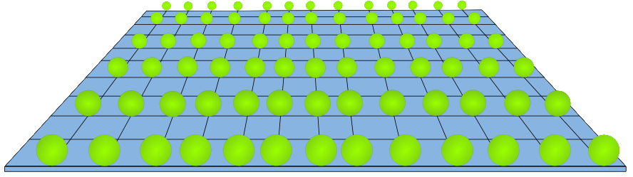 Des dimensions enroulées en sphères, dans le contexte de la théorie de Kaluza-Klein